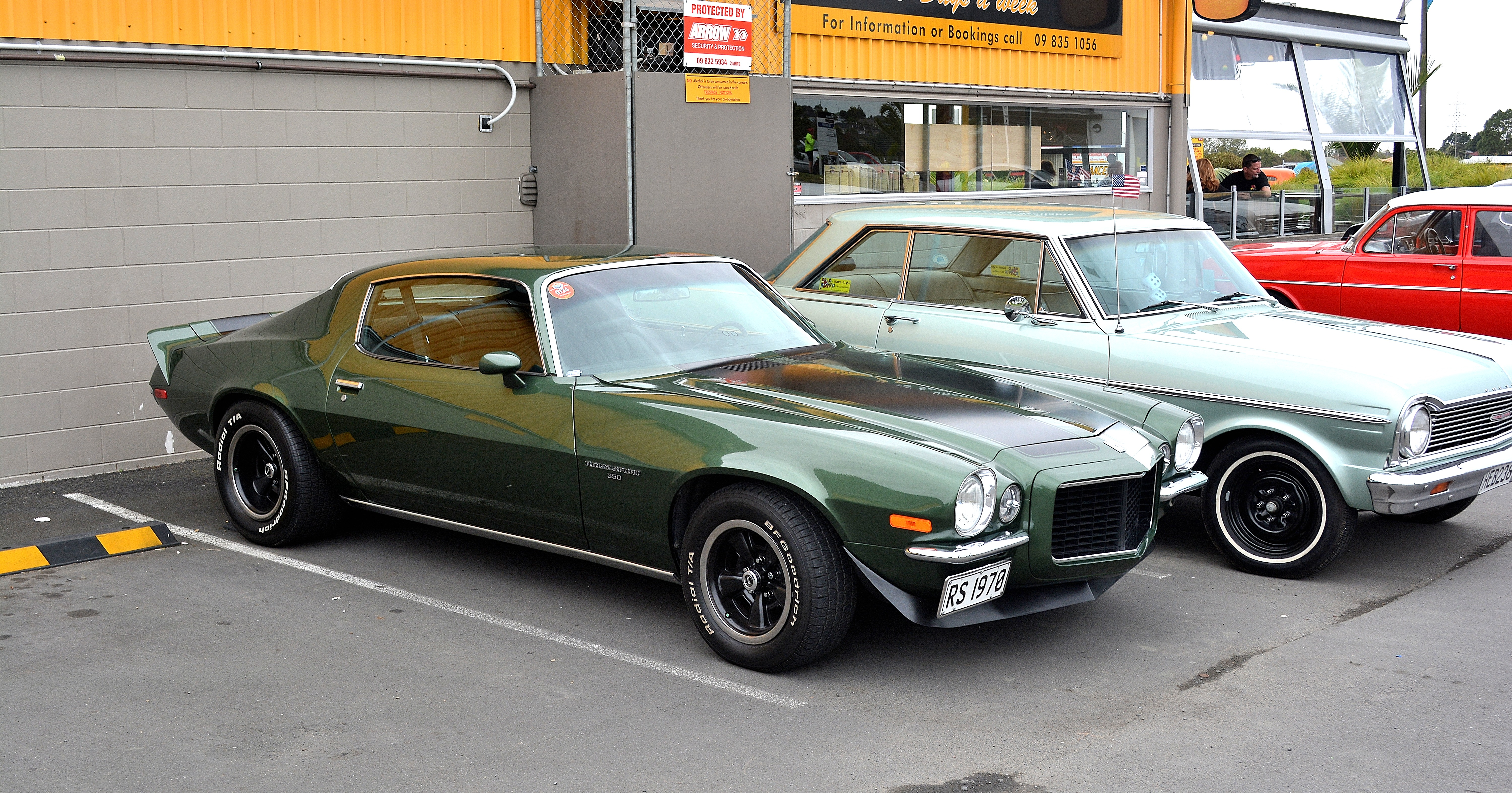 Hangar Bar,West Auckland.New Zealand